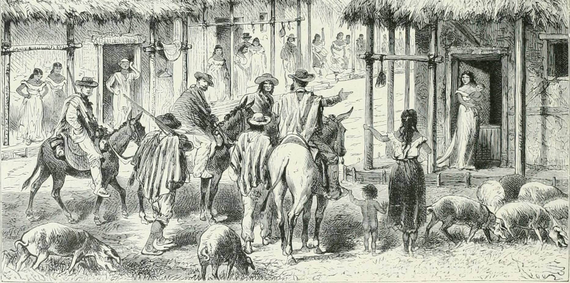 Text Appearing Before Image: Text Appearing After Image: Llegada á \illavicencio Susumuco es una vivienda espaciosa construida con postes sin cuadrar ni desbastar ycubierta de hojas de palma, en donde hacen alto todos los viajeros que recorren el camino delos Llanos. De Susumuco parten los buscadores de quina (quineros), que registran las mon-tañas; tuve ocasión de hablar con uno de ellos que me dijo: —Aquí se conocen dos clases de quina: la colorada y la amarilla: esta es mucho másestimada que aquella. Cuando vamos á buscarla, salimos por quince días, en comitivas decuatro ó cinco hombres, ni uno más. Lleva cada cual cuatro libras de panela (azúcar enbruto) y dos libras de harina de maíz. Lo restante nos lo da la caza, muy poco abundante enestos andurriales. El instrumento, una especie de hacha, de que nos servimos para cortar laquina es el que veis ahí, y se llama abuinche ó machete de rozar. Con él derribamos el árbol ylo despojamos de su corteza. VIAJE Á LA AMÉRICA EQUINOCCIAL 549 —¿Y cuánto ganan Vds. en esos qui